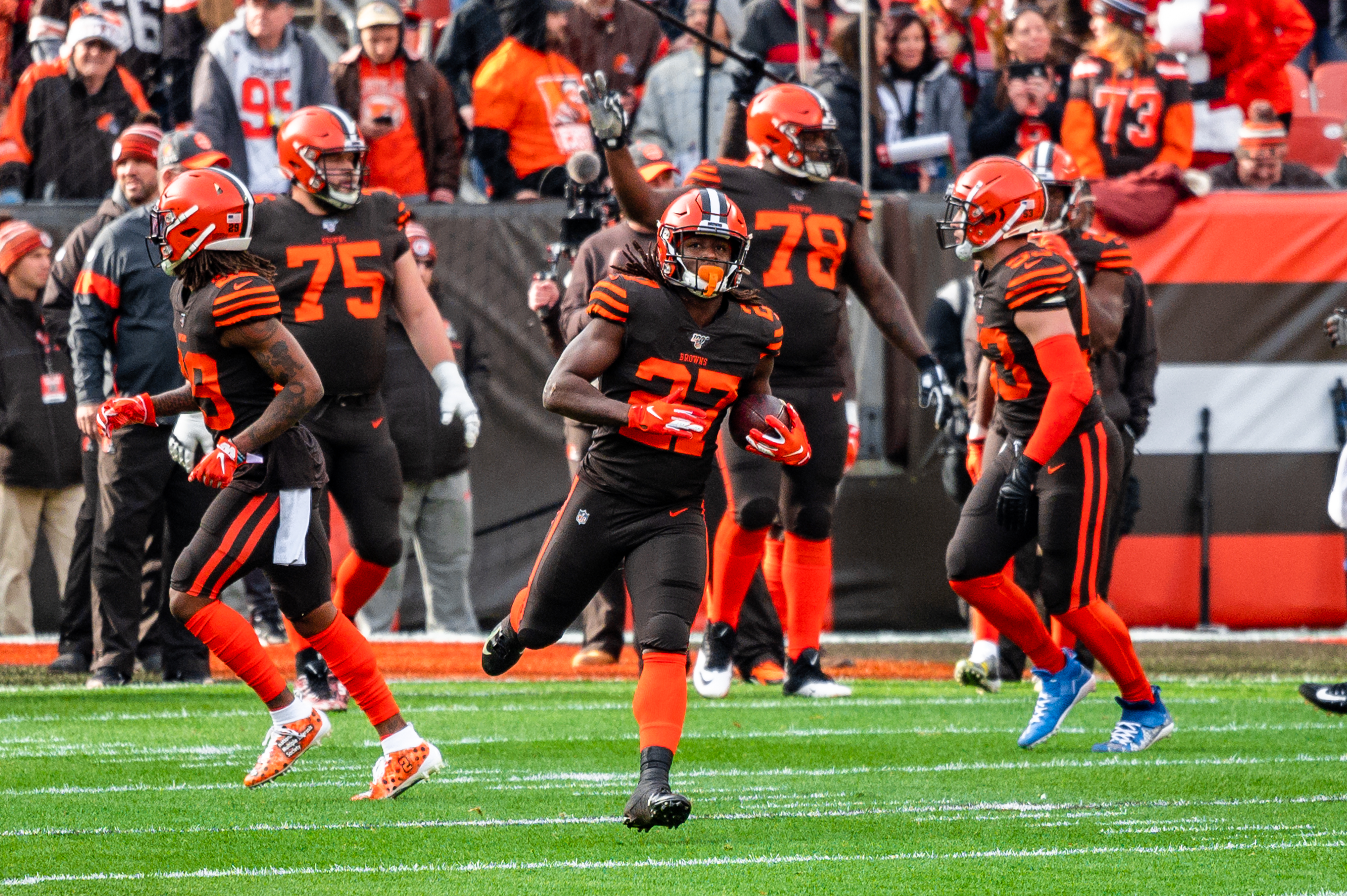 Kareem Hunt